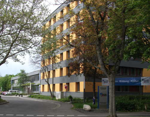 Bayernkolleg Schweinfurt Frontansicht